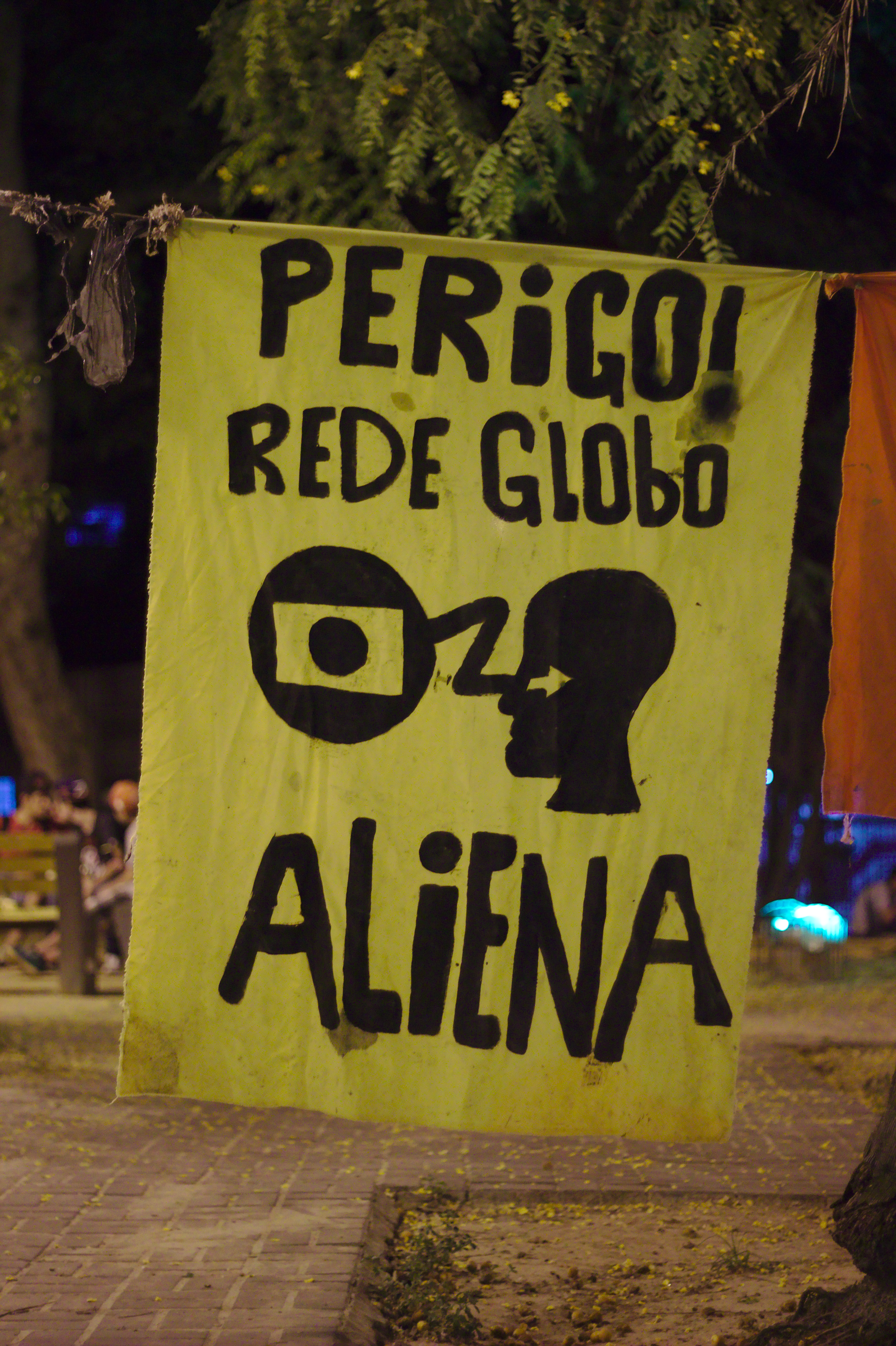 Bandeira estendida durante a Batalha dos Bombeiros.